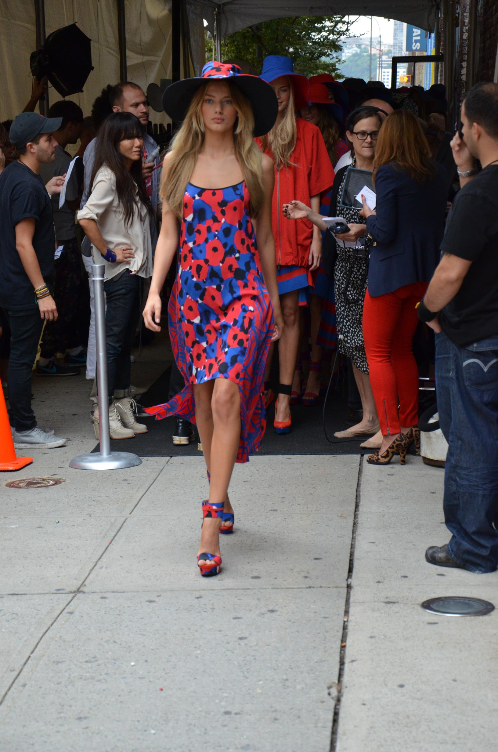 Bregje Heinen Walks DKNY SS2012